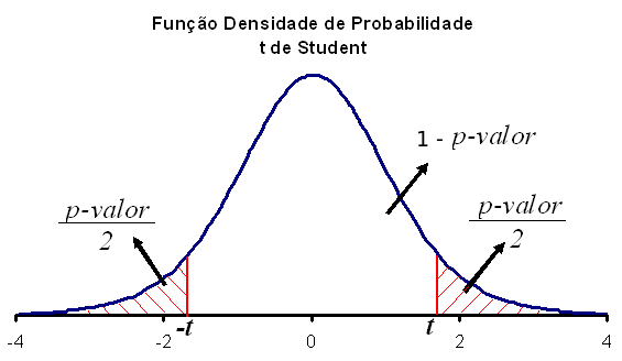 A imagem mostra a colocação do p-valor.